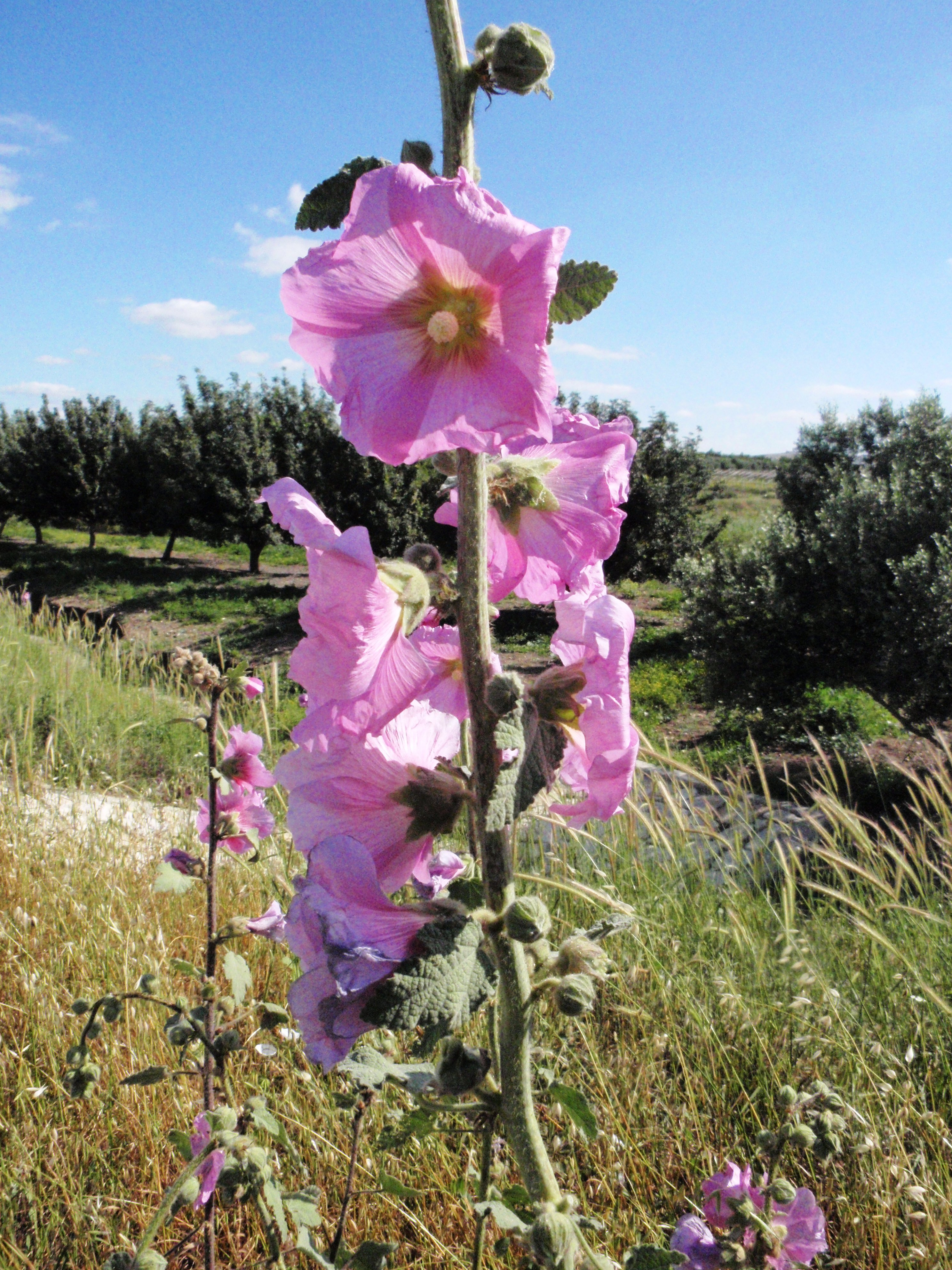 חוטמית זיפנית צולם בכביש 6